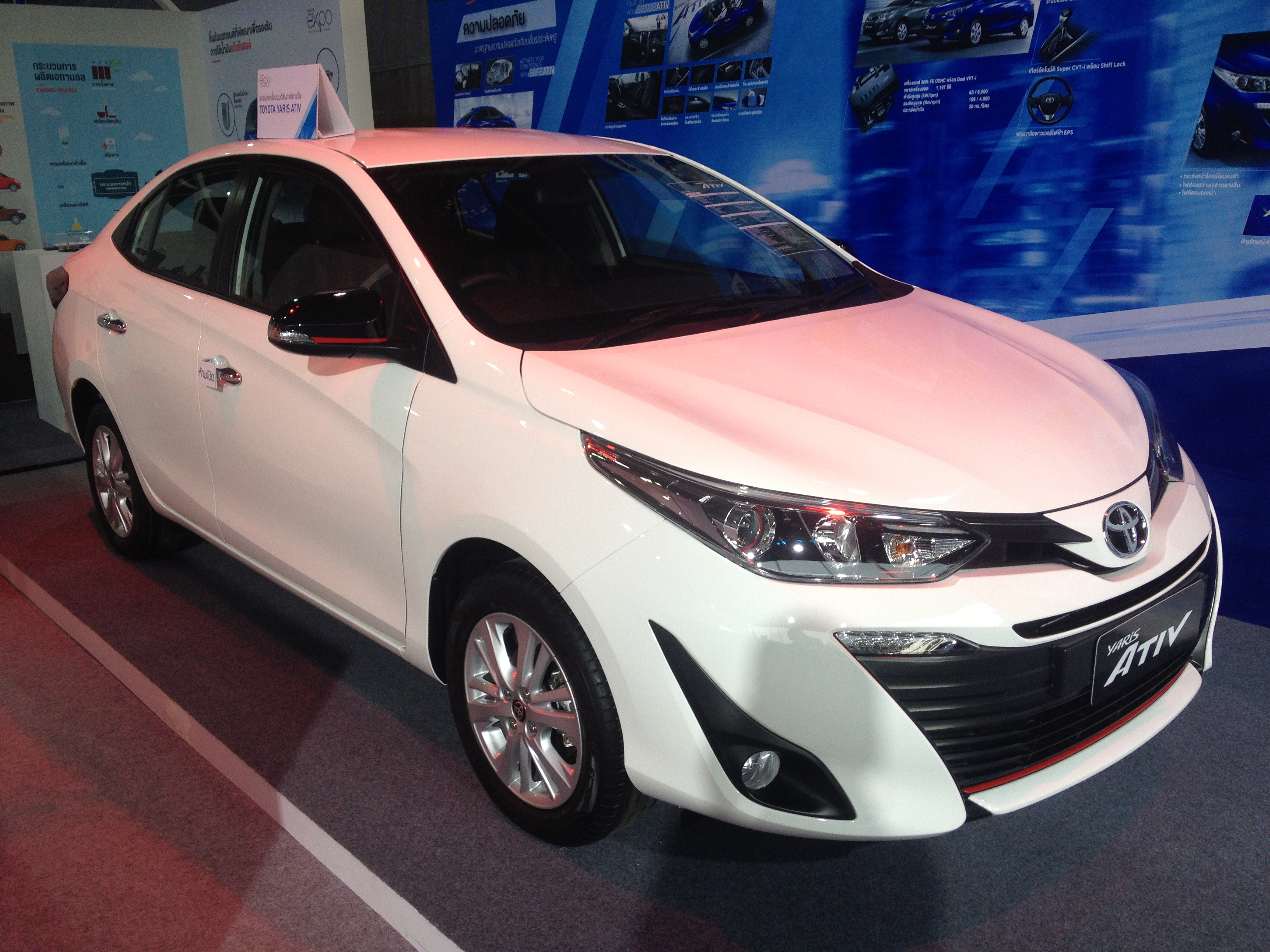 ด้านหน้าโตโยต้า ยาริส เอทีฟ